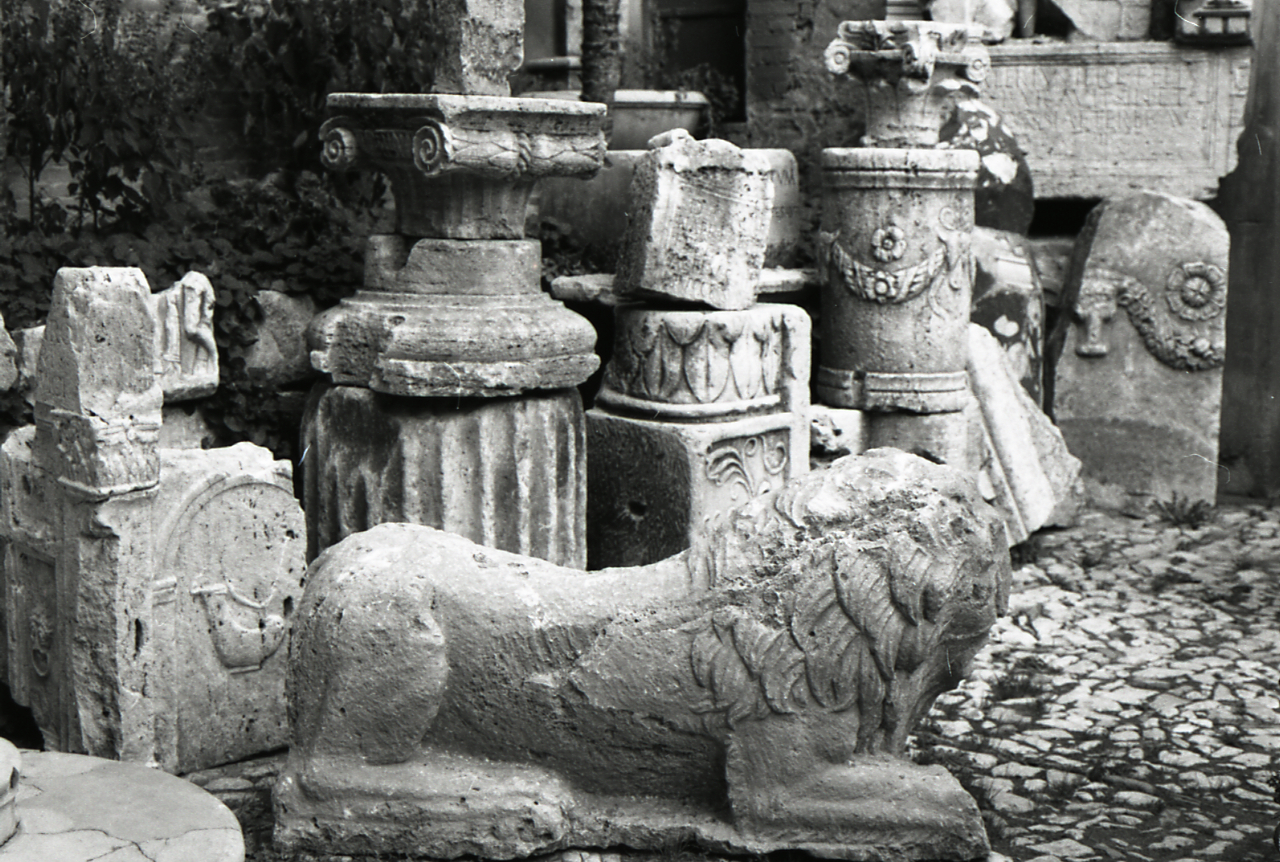 Servizio fotografico : Amelia, 1967 / Paolo Monti. - Strisce: 4, Fotogrammi complessivi: 20 : Negativo b/n, gelatina bromuro d'argento/ pellicola ; 35 mm. - ((I fotogrammi hanno una doppia numerazione. . - Sul portanegativi: Nikon Agfa 21. - Sul dorso del portanegativi Monti specifica: "T.C.I. Panorami. Mura. Antiquarium Municipale". - Occasione: Documentazione per la pubblicazione: Umbria, Milano, TCI, 1969. - Fonte: Agenda di Paolo Monti: Monti/ 3 aprile 1966 - 9 marzo 1971/ 12421-16823 (1966-1971), presso Archivio Paolo Monti